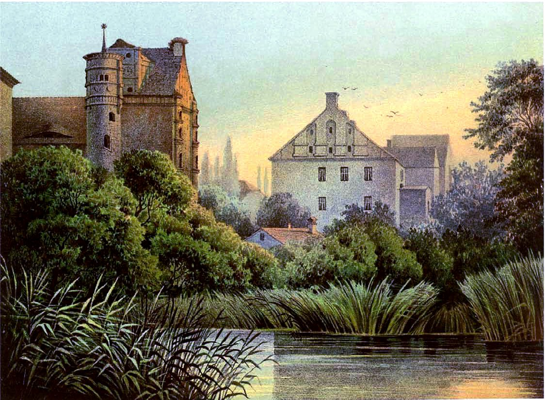 Altes (links) und Neues (Bildhintergrund) Schloss Freyenstein, Kreis Ost-Prignitz